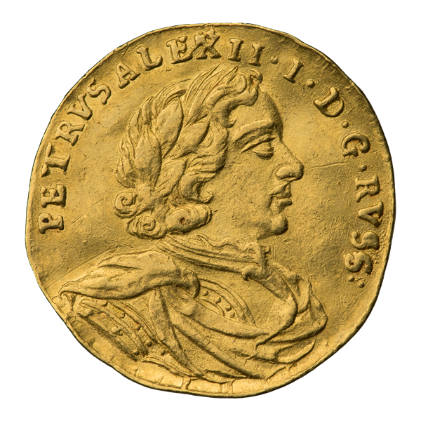 Червонец 1716 г. (аверс). ГМ LXXXII.8; Биткин 55 (R2). Профильный портрет царя, вправо; в латах и плаще без пряжки, с венком на голове. Круговая надпись, продолжающаяся на реверсе: PETRVS ALEXII [FILIVS]∙I∙D[EI]∙G[RATIA]∙RVSS[IÆ]: [IMPERATOR, MAGNVS DVX MOSCOVIÆ] (Пётр Алексеевич I, Божьей милостью России [повелитель, Великий Князь Московский])